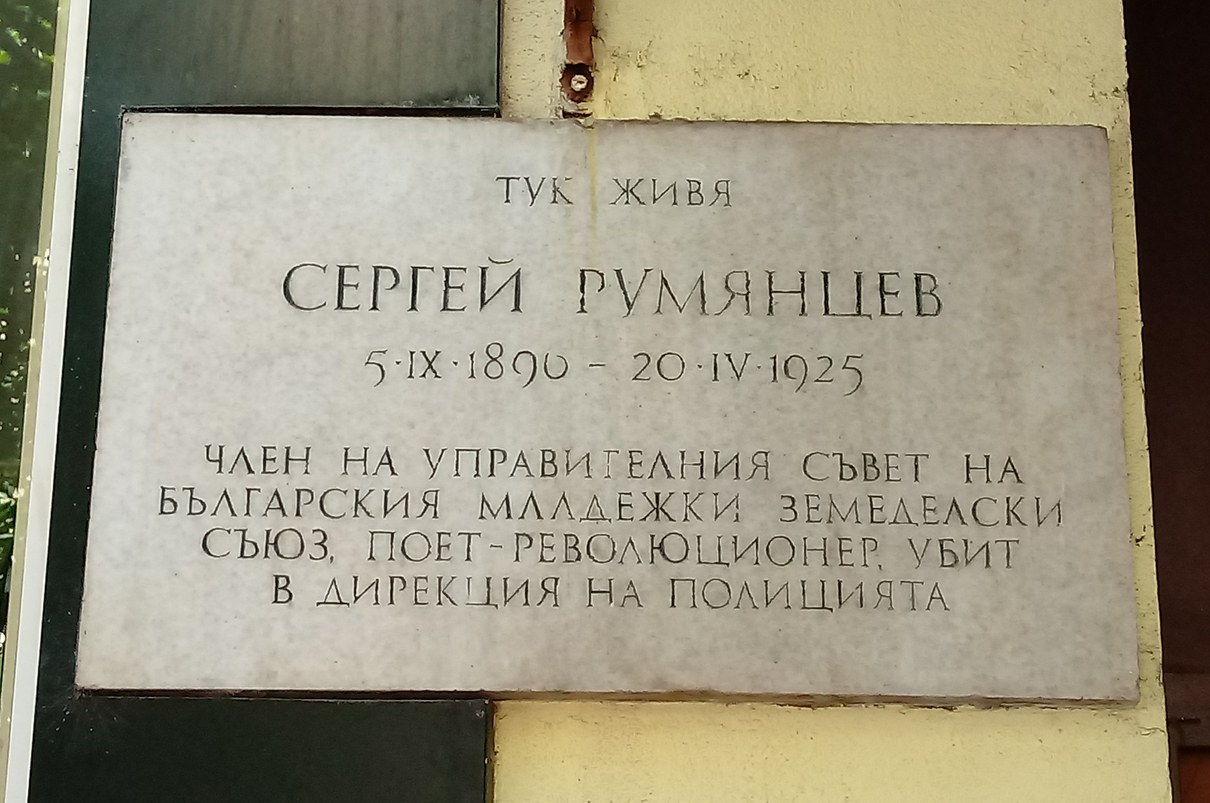 Sergey Rumyantsev memorial plaque, 19 Pirotska Str., Sofia